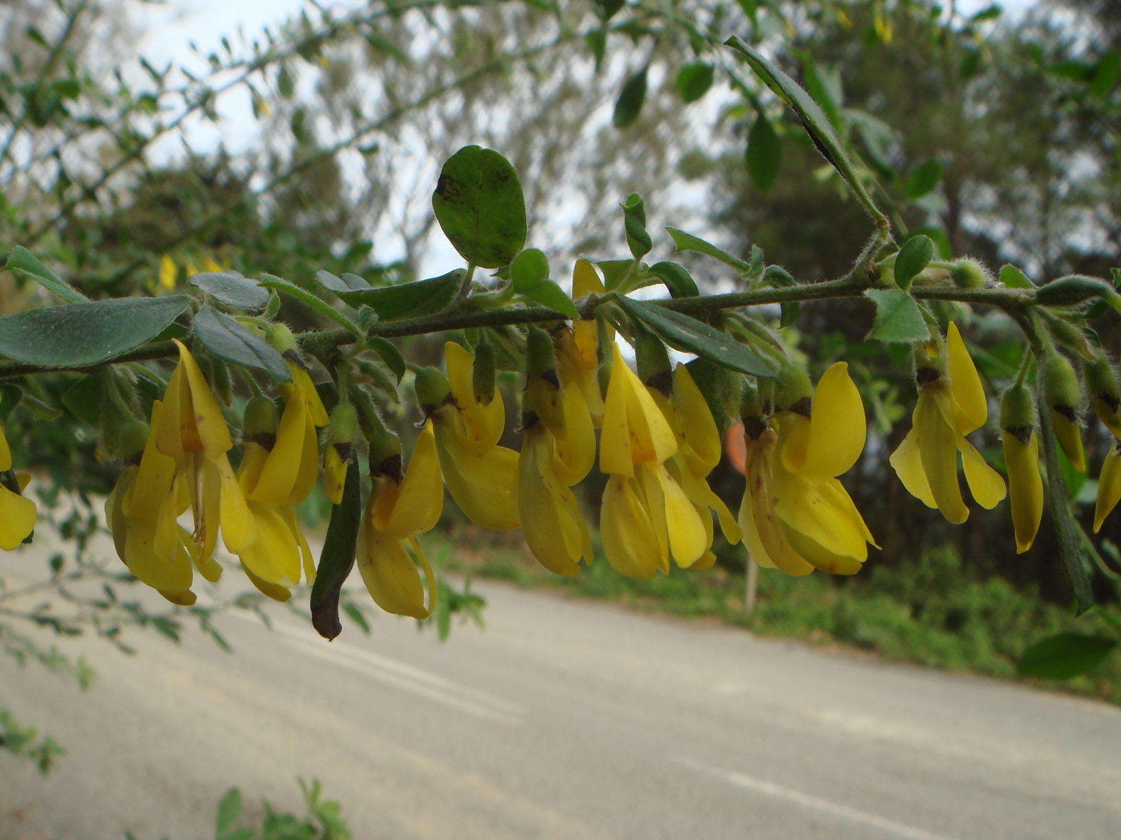 Escobón negro (Cytisus villosus), Ceuta, España